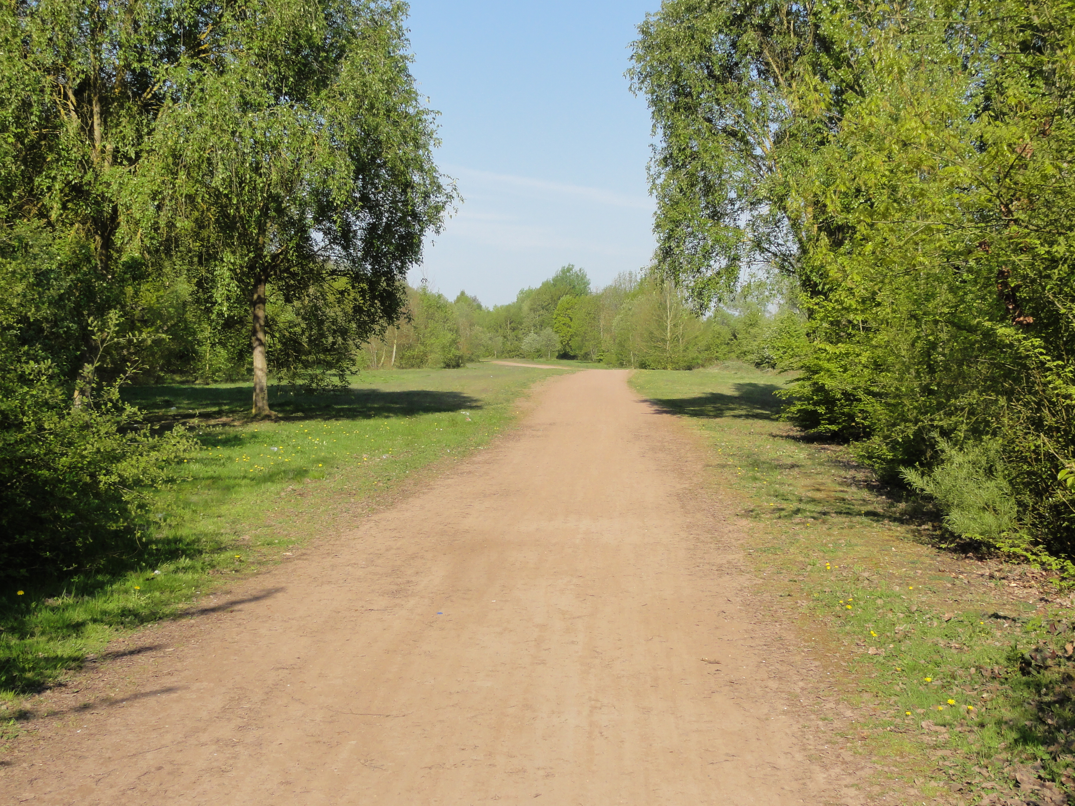 Terril n° 253 dit Cavalier Barrois Lemay, Fosse Barrois à Lemay, Pecquencourt, Nord, Nord-Pas-de-Calais, France.